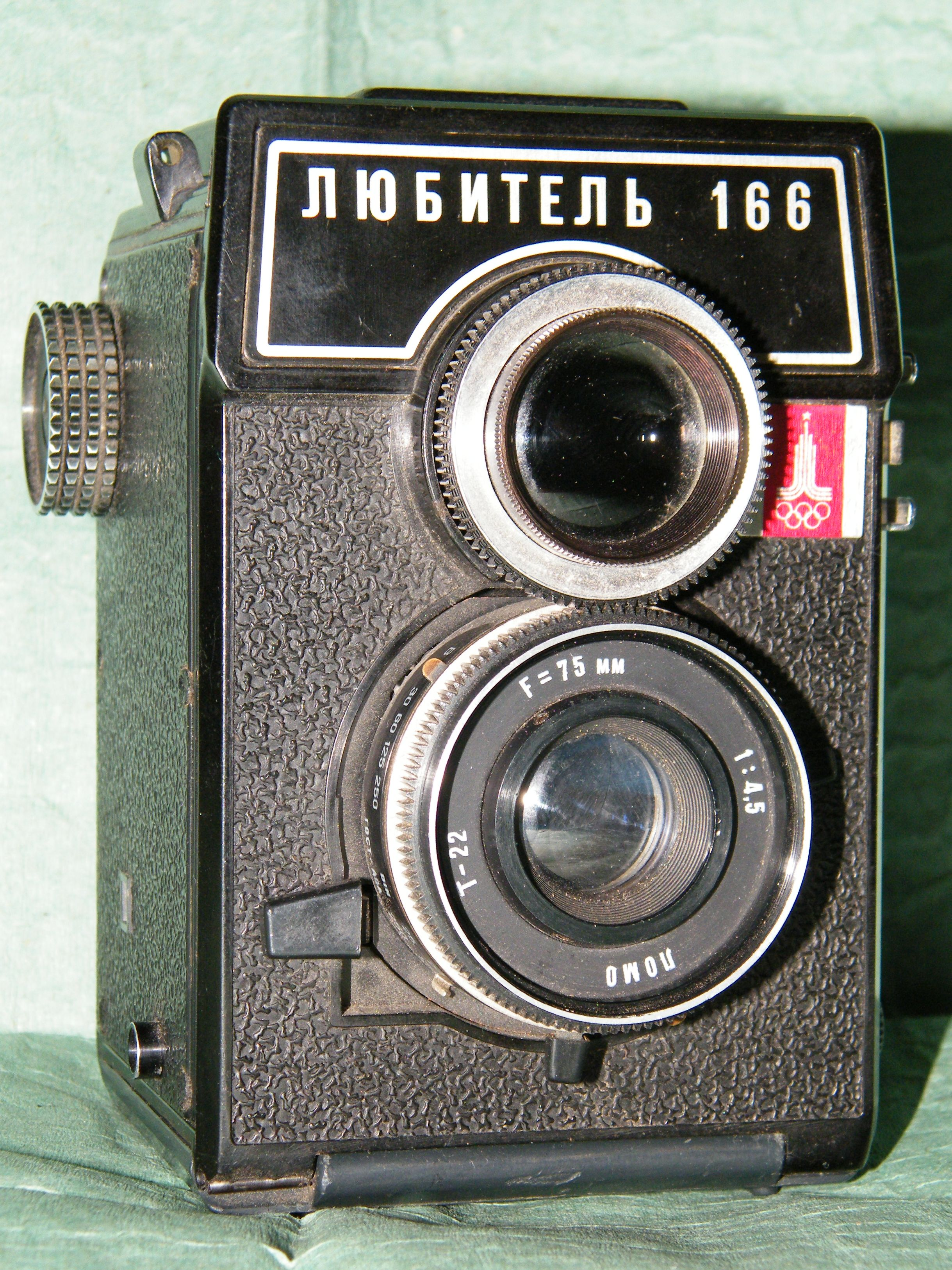 Любитель-166 1979 год